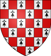 échiqueté d'argent et de gueules, chaque pièce d'argent chargée d'une moucheture d'hermine de sable